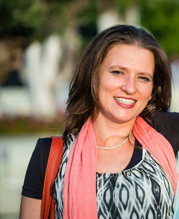 רות קרא איוונוב קניאל משוררת ישראלית